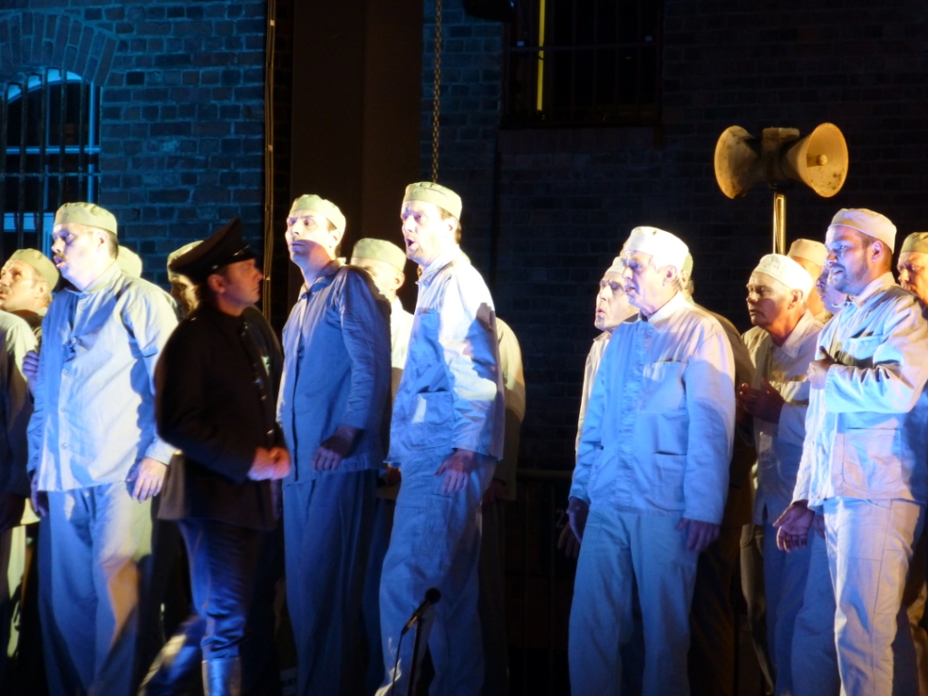 Gefangenchor vor Gefängnis Premiere Cottbus 28.06.2014